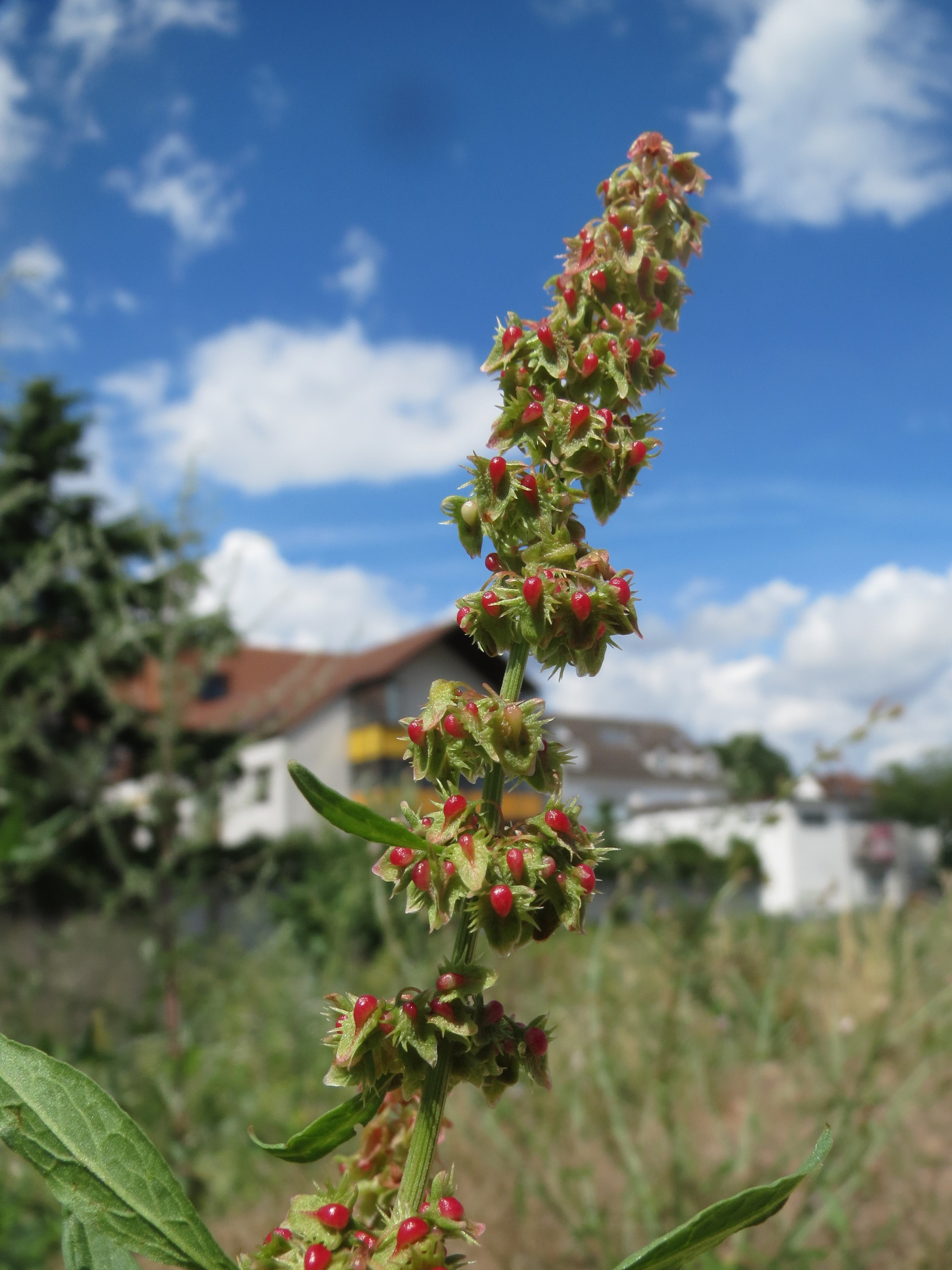 Stumpfblättriger Ampfer (Rumex obtusifolius) auf einer Brachfläche am Messplatz in Hockenheim